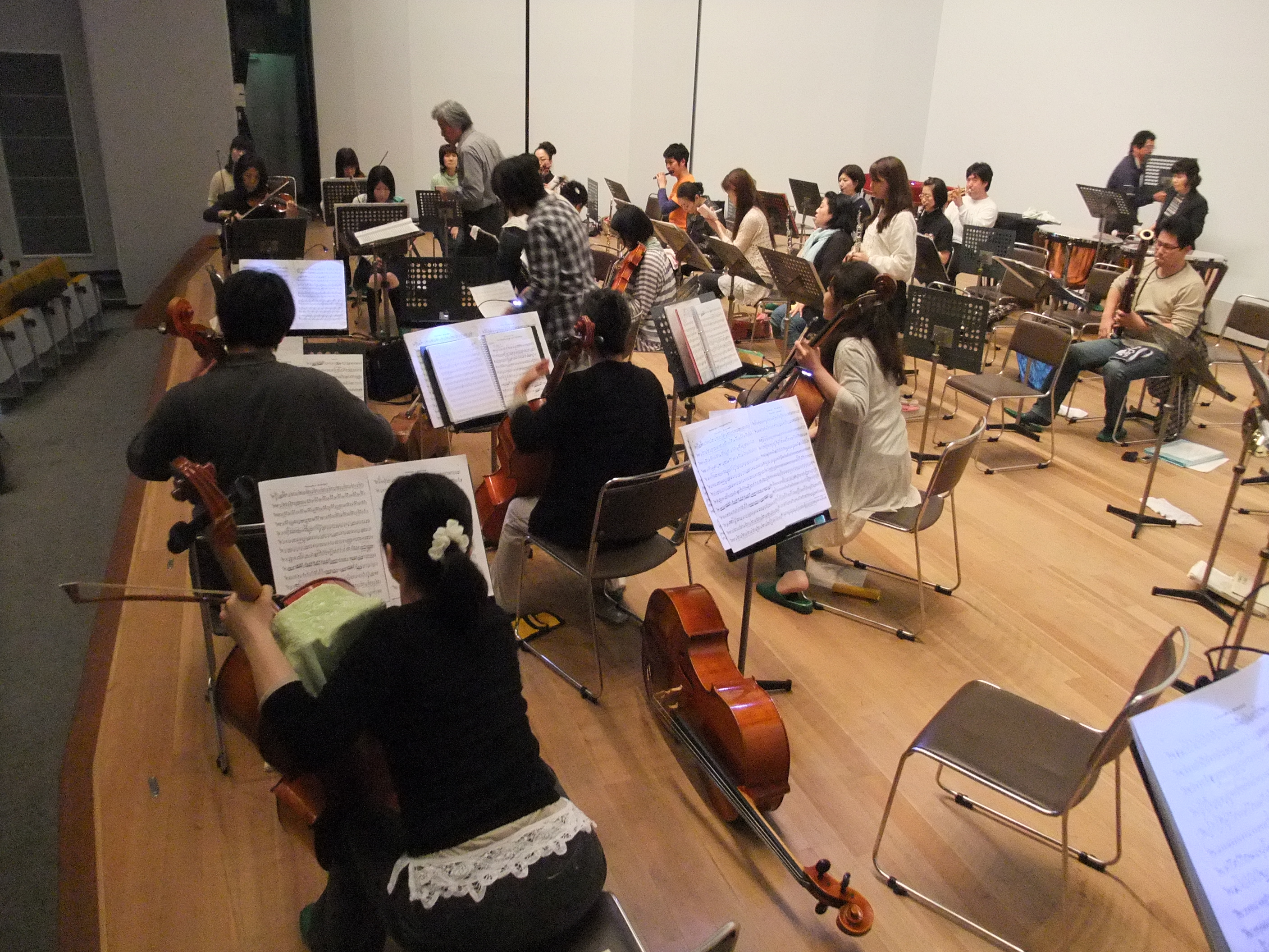 サンパルオーケストラ。NHK交響楽団首席チェロ奏者による指導中（休憩時間で指導者は席を外している）